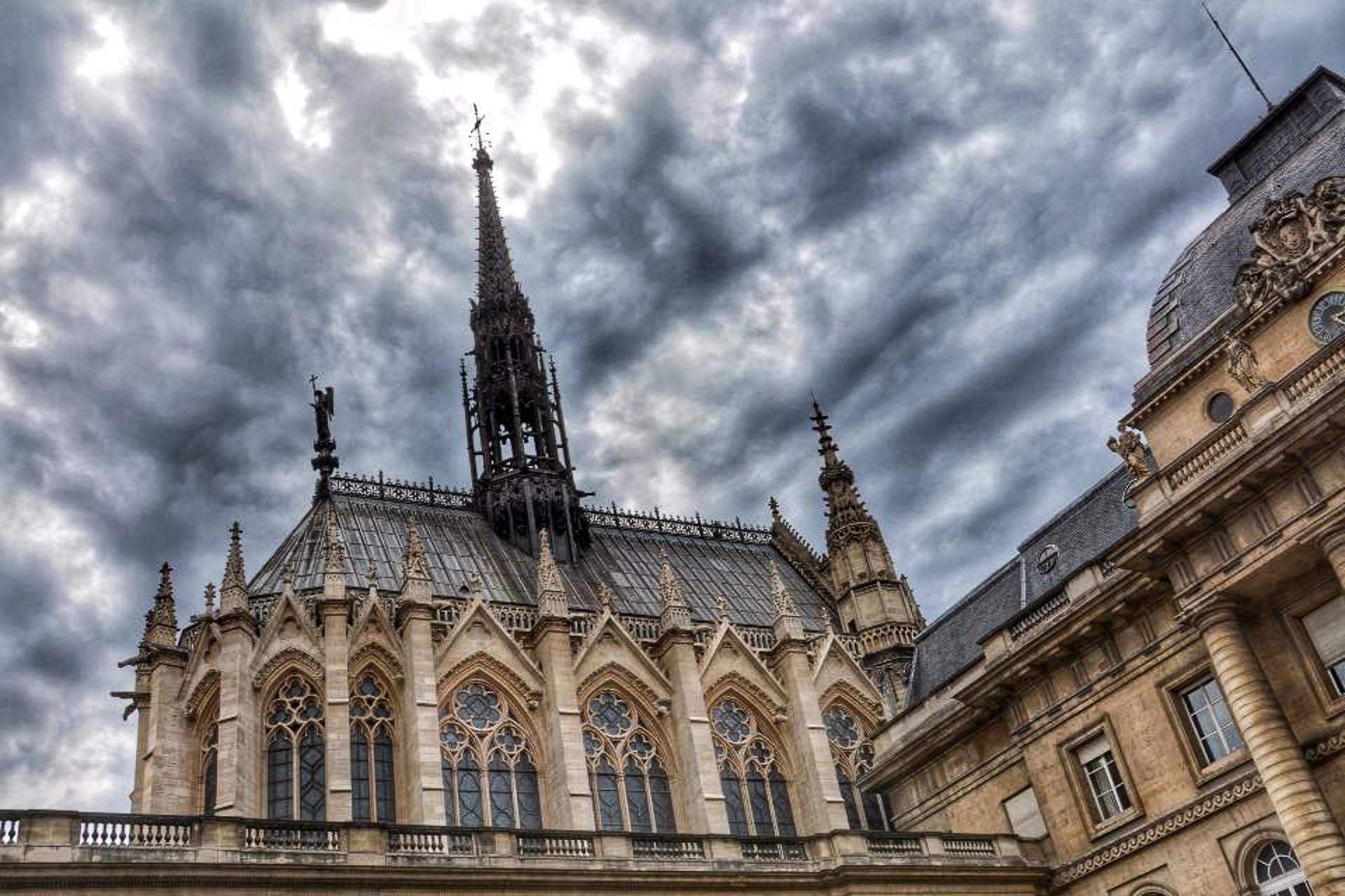 Façade Nord de la Ste Chapelle, vue depuis la cour du Palais de Justice .